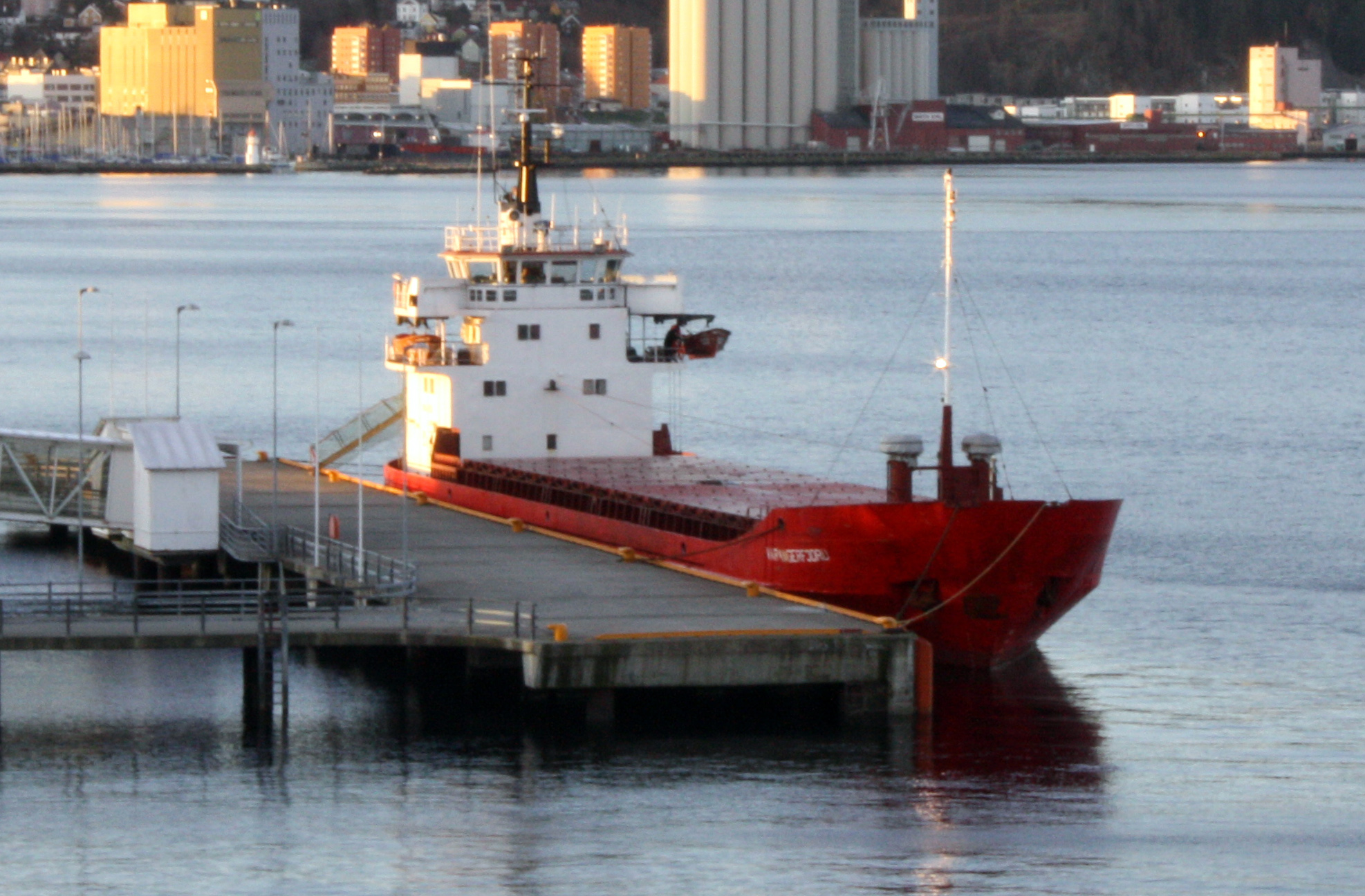 Varangerfjord ved Turistskipskaia i Trondheim.